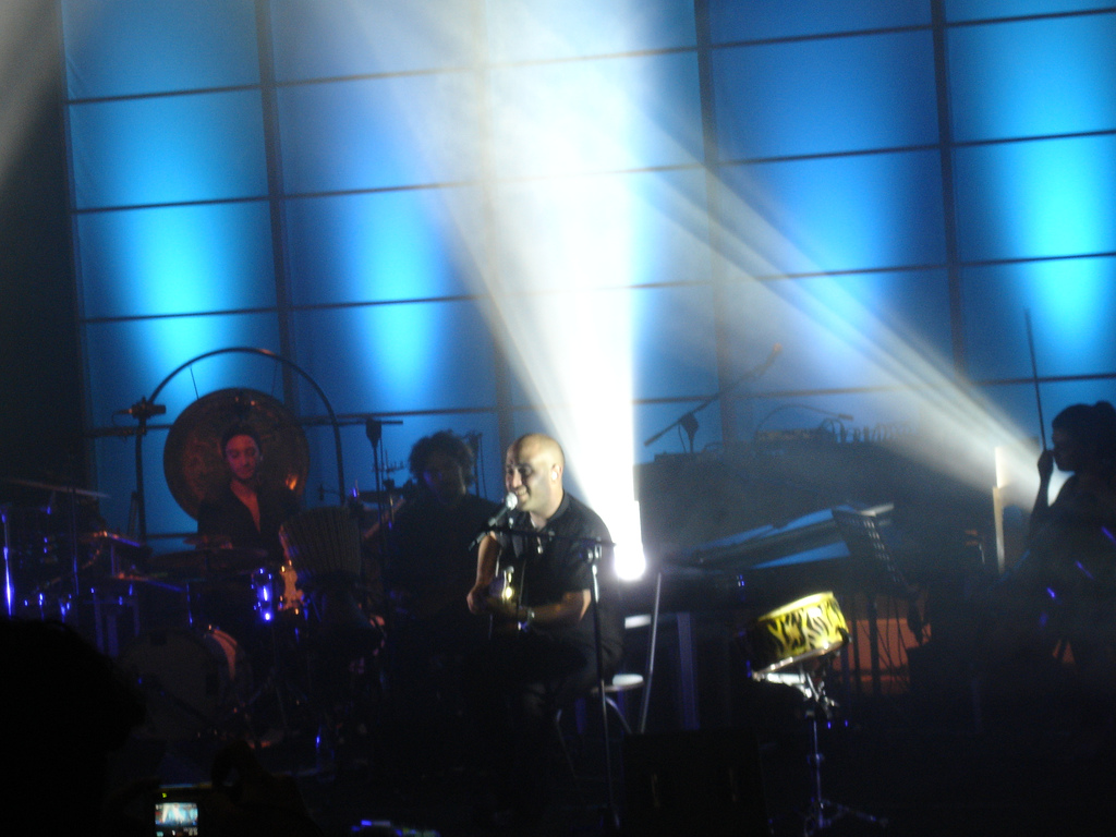 Negramaro